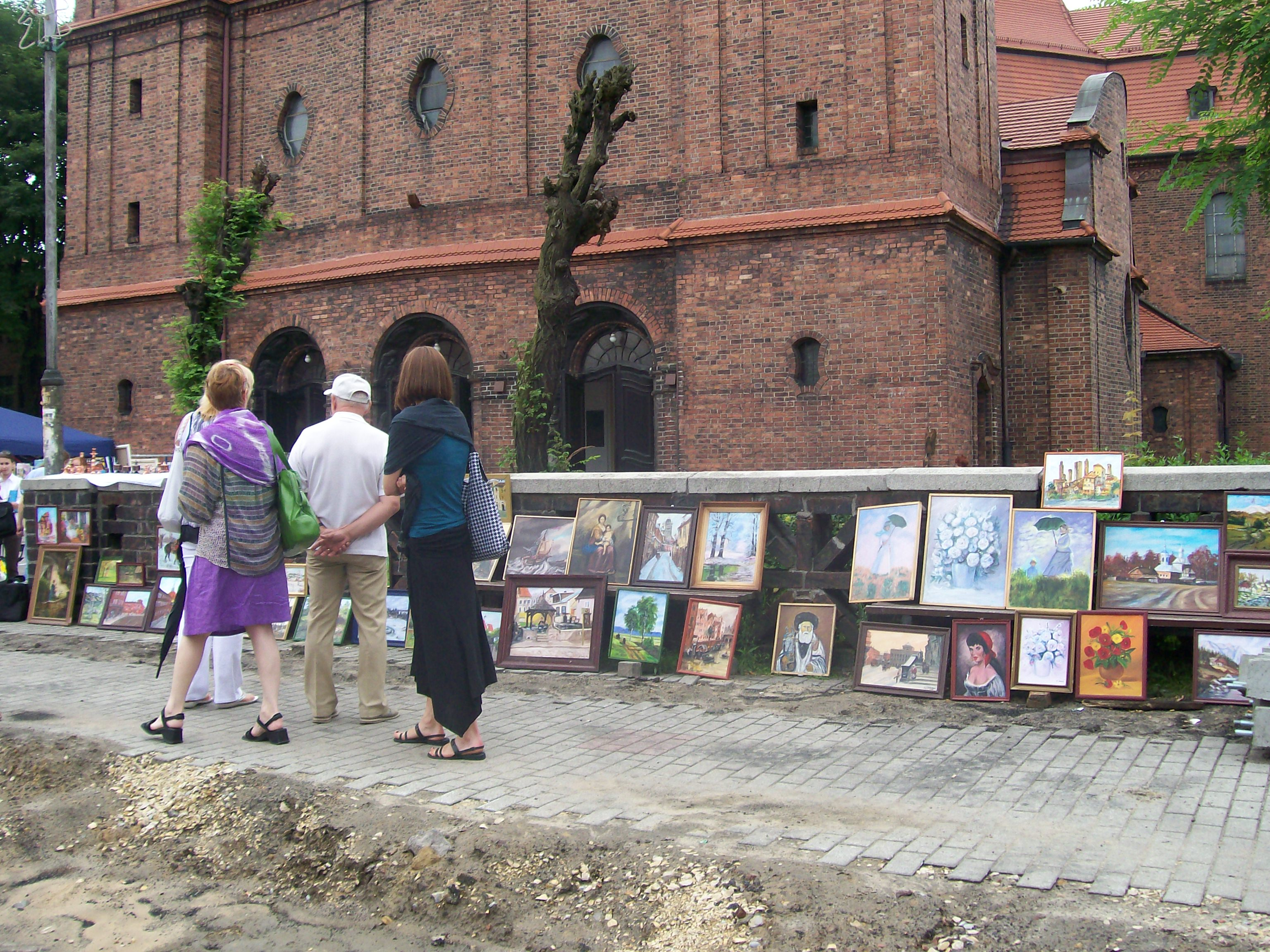 3 edycja Międzynarodowego Festiwalu Sztuki Naiwnej